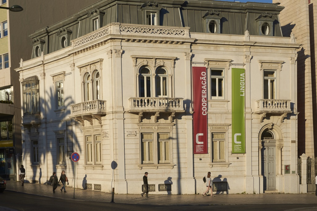 Palacete Seixas, antiga sede do Instituto Camões